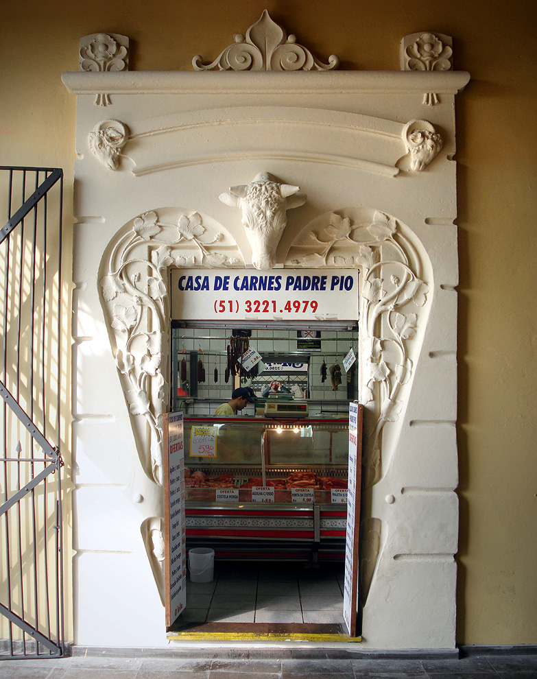 Interior do Mercado Público de Porto Alegre, Brasil. Detalhe da decoração antiga